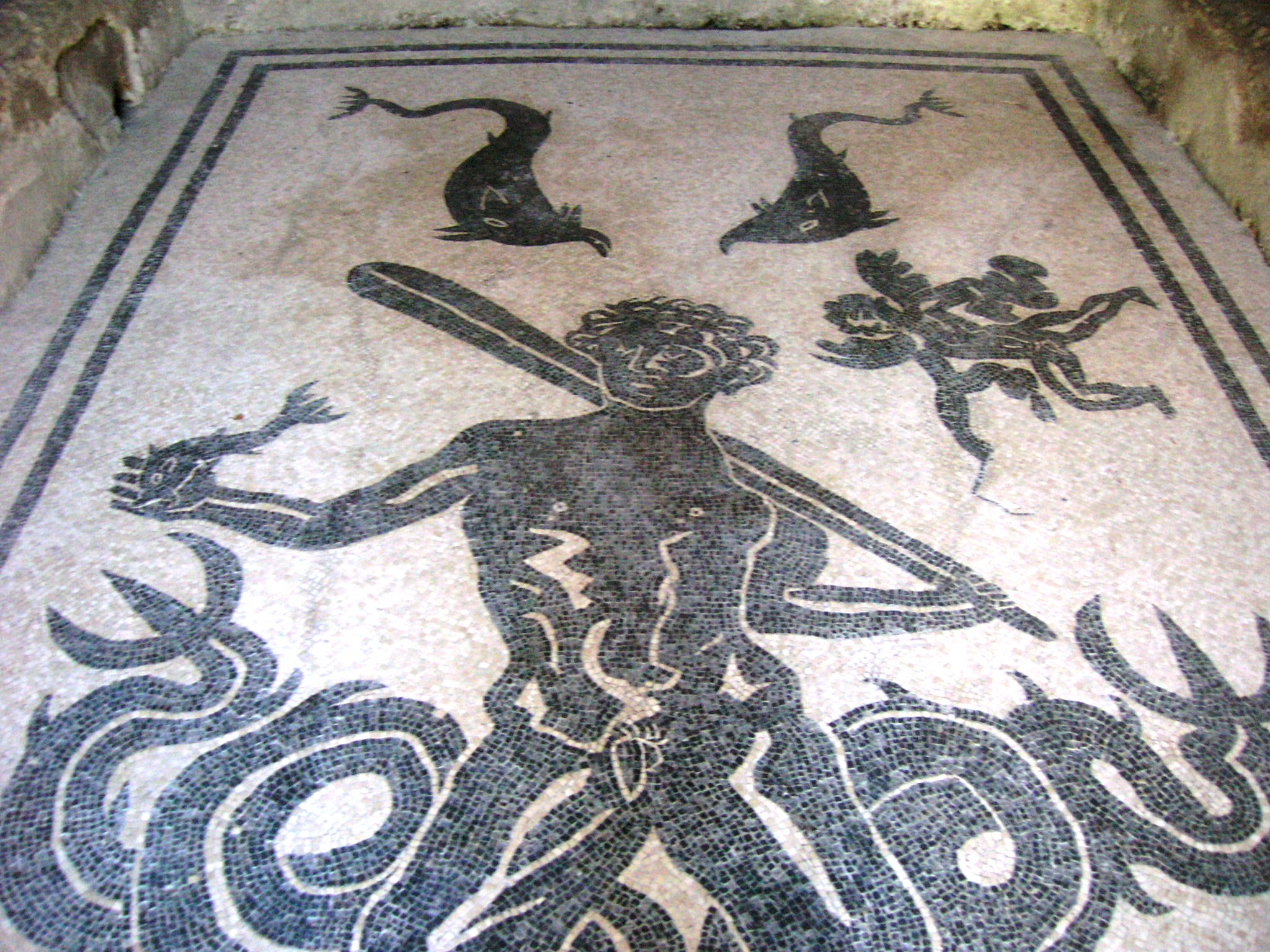 Terme del Foro